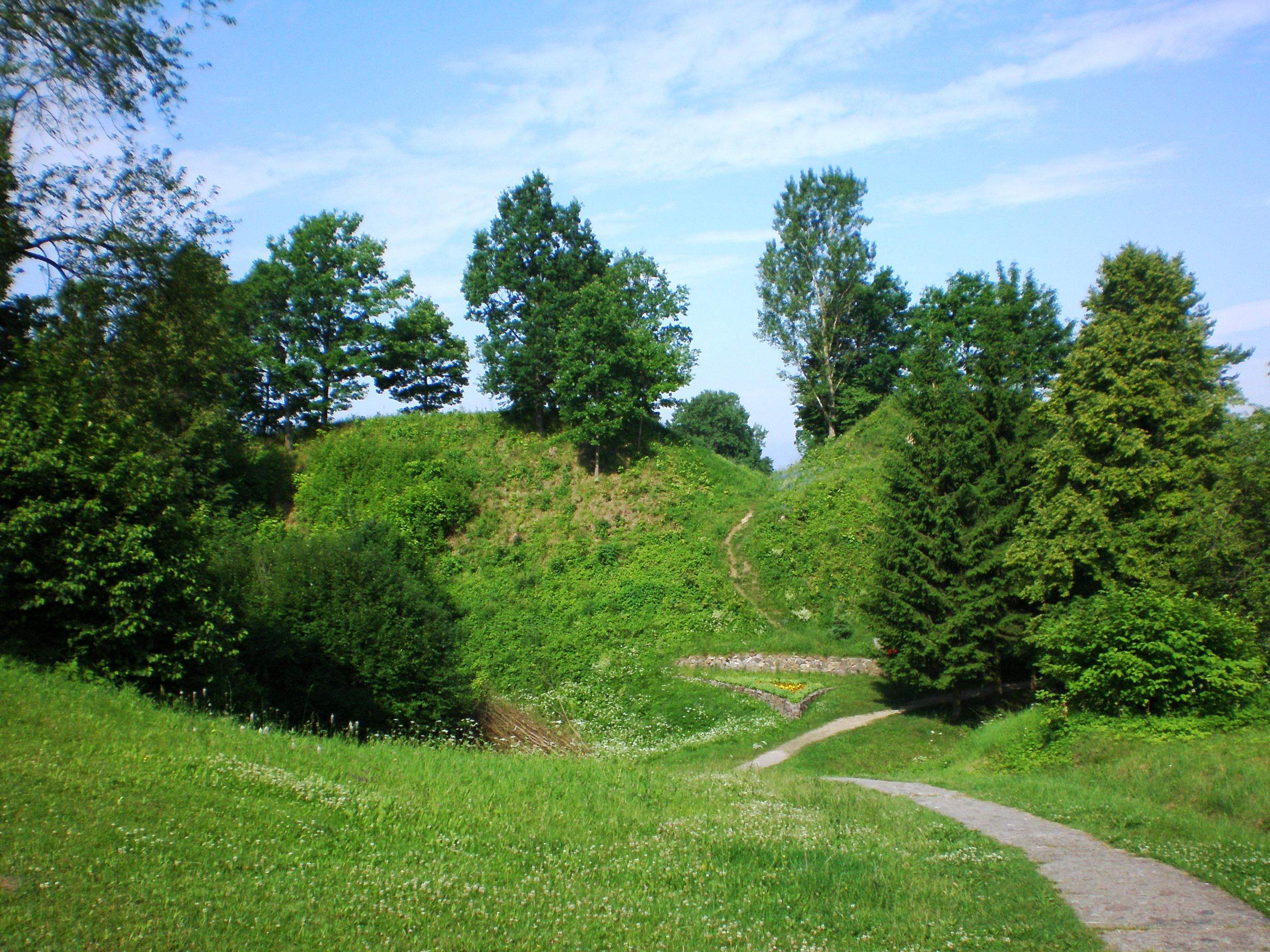 Punios piliakalnis, Alytaus raj.